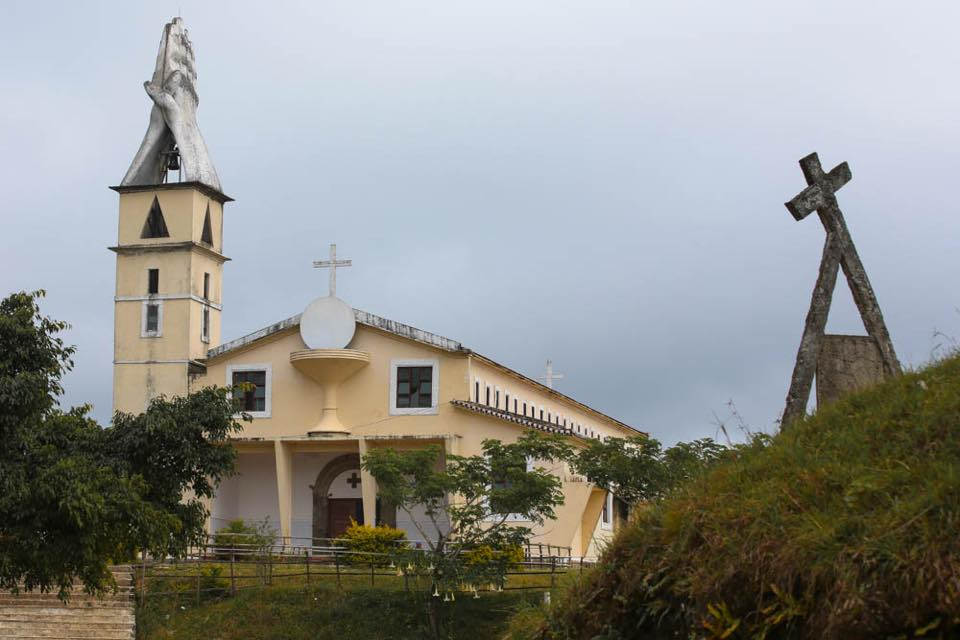 Kirche von Letefoho